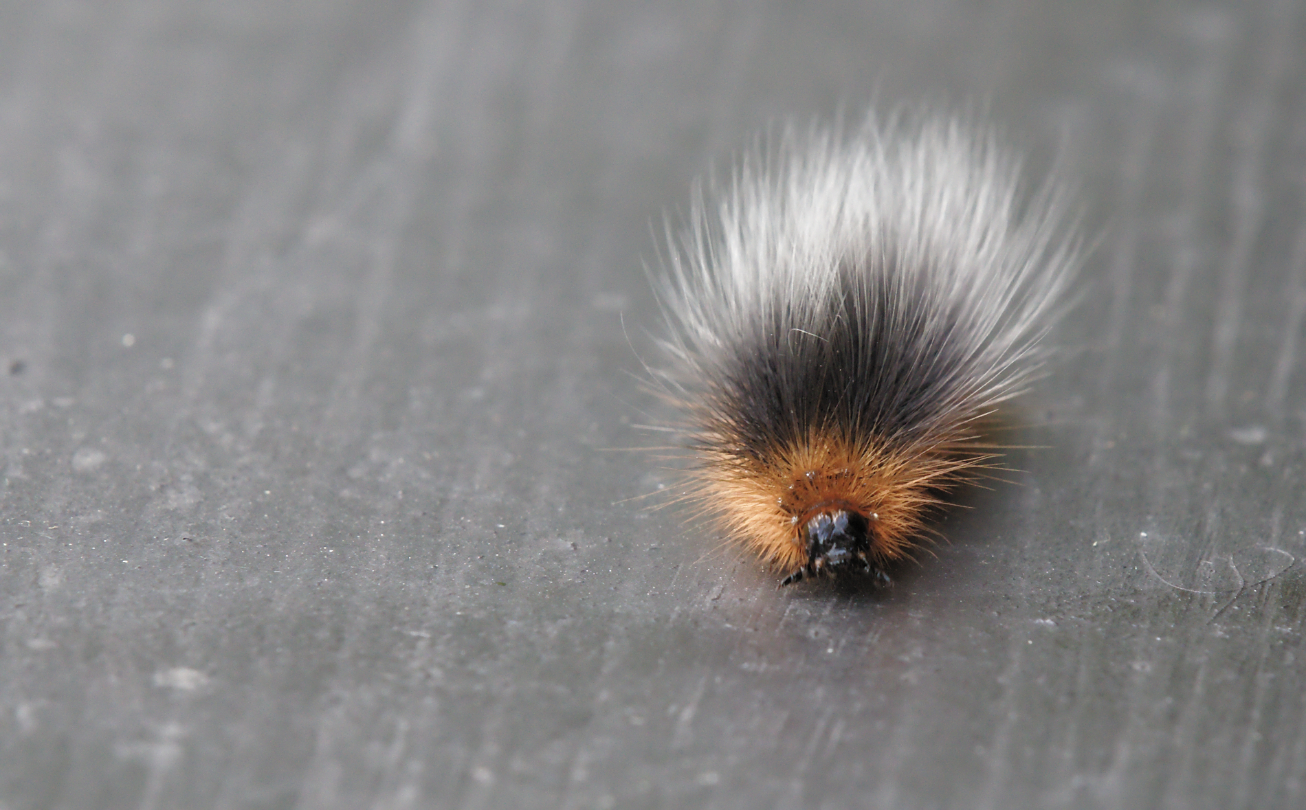 Gąsiennica niedźwiedziówki kai w czerwcu pod koniec okresu żerowania. Długość około 5cm.